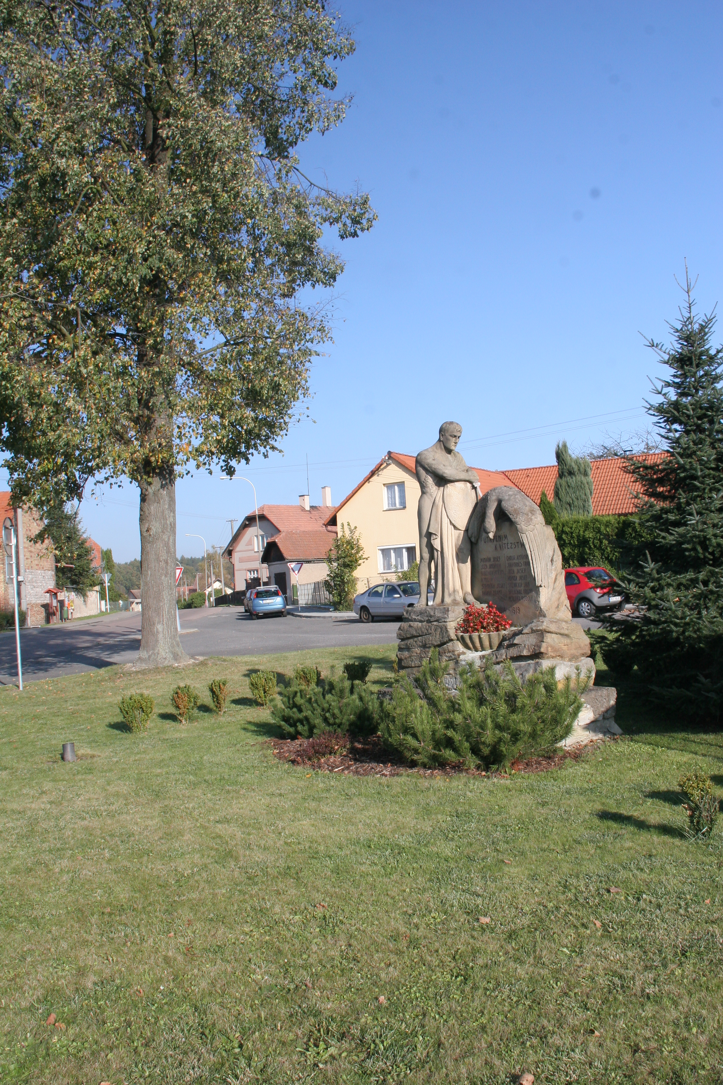 Jaroslav pomník padlých